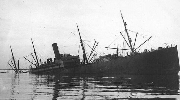 Wrack der von U 39 1916 torpedierten NORSEMAN